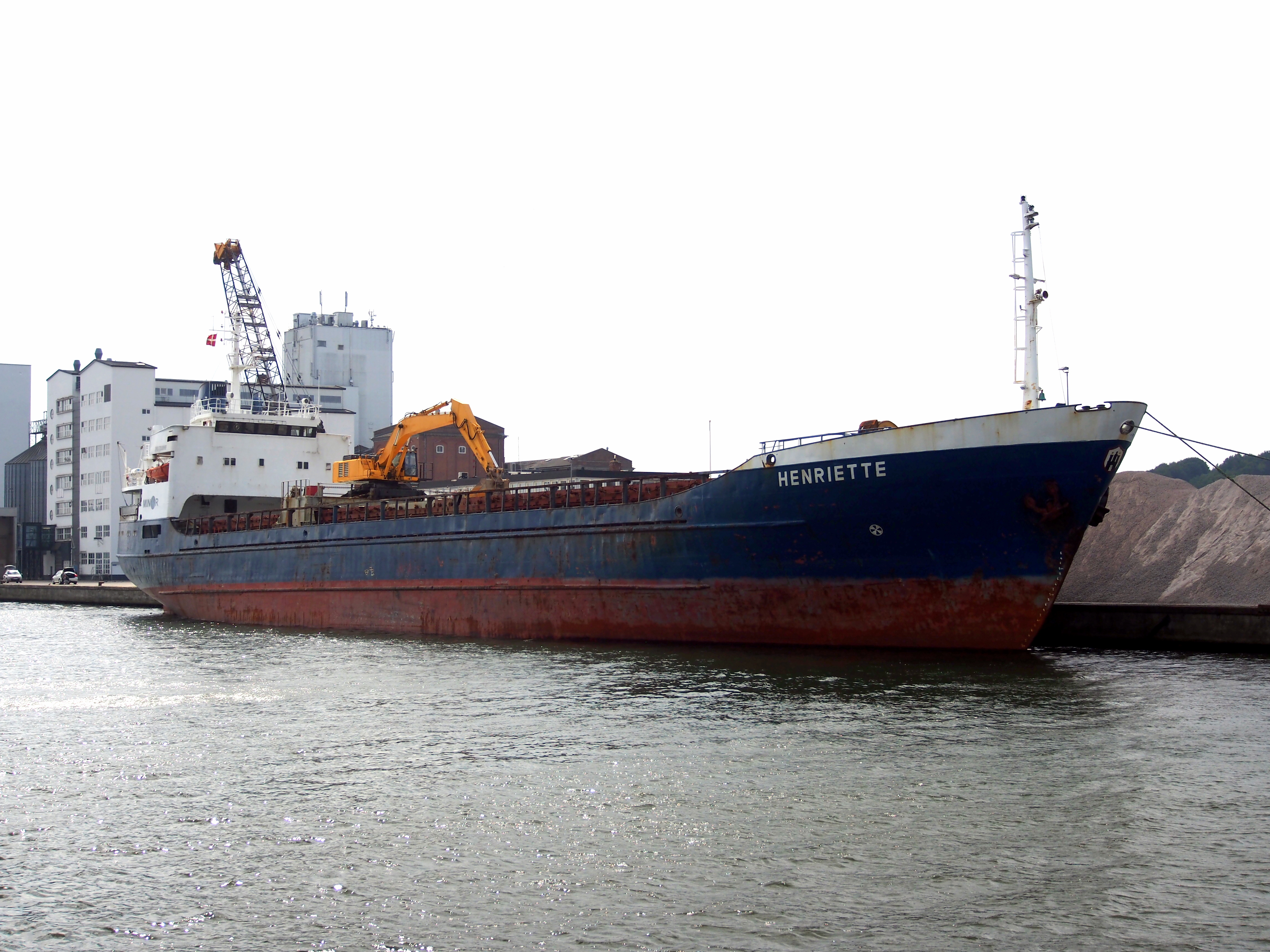 Photographed in Vejle, Denmark.